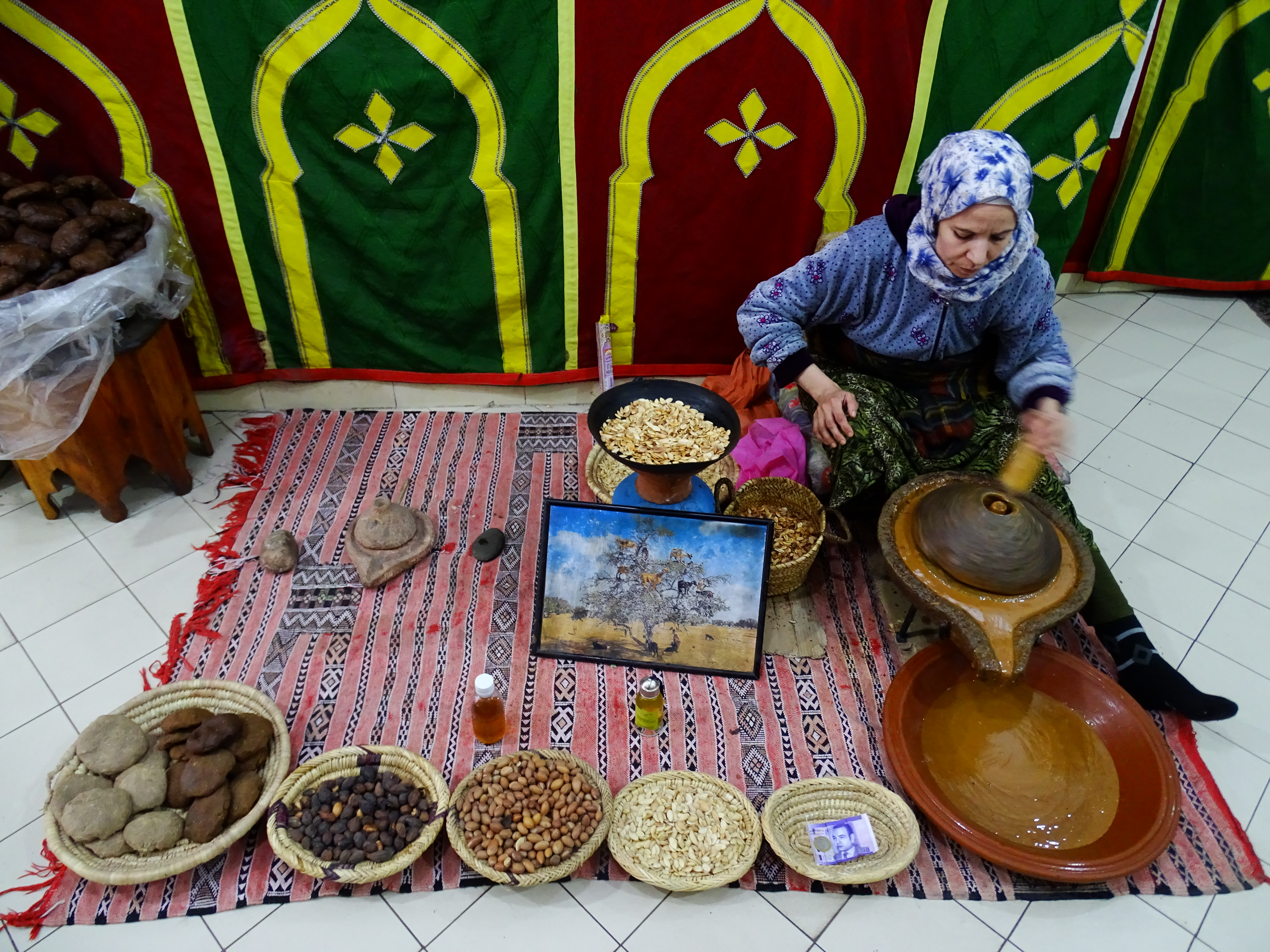 Argan products are produced by traditional way in a unique area of Morocco near Essaouira This photo has been taken in the country: Morocco